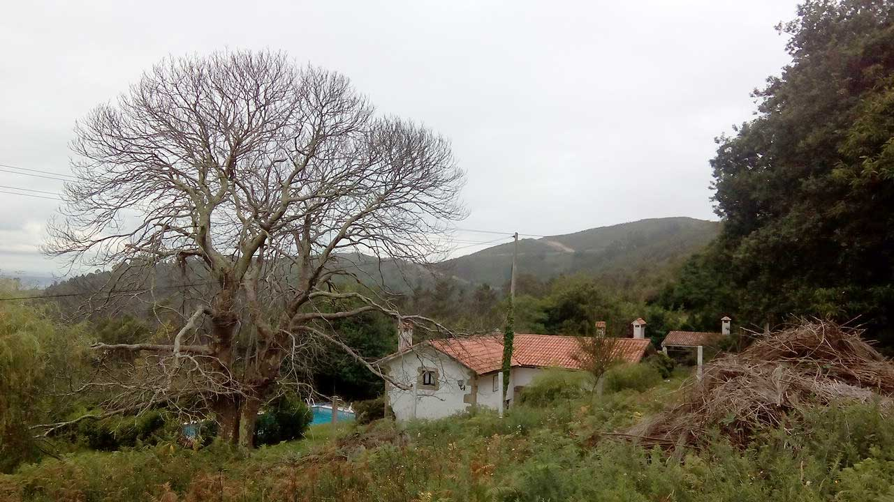 Vista do Vilar, O Val.